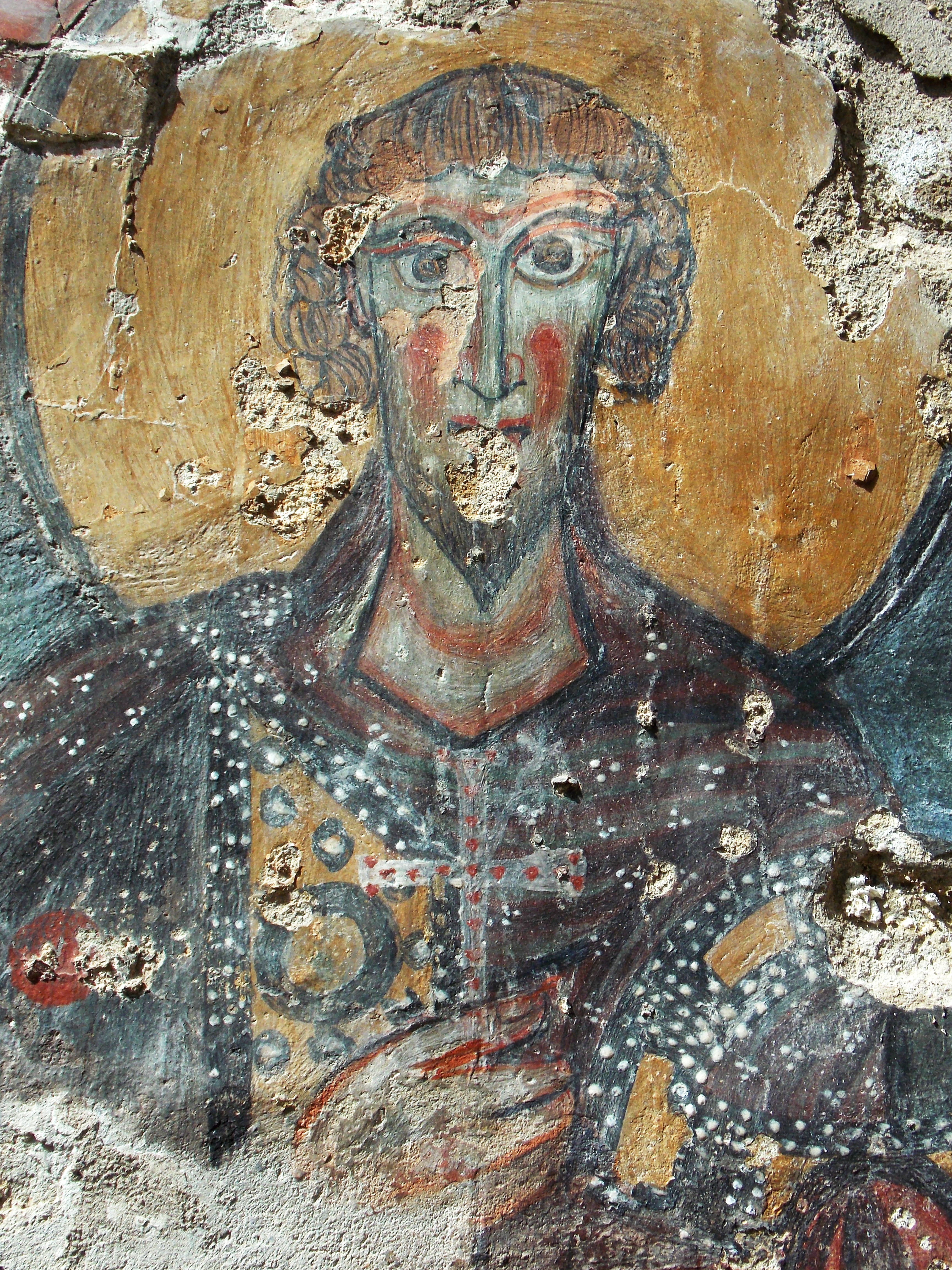 I ruderi dell'abside dell'oratorio di San Giorgio a Faicchio (BN) con gli affreschi, dipinti fra il X e il XV secolo